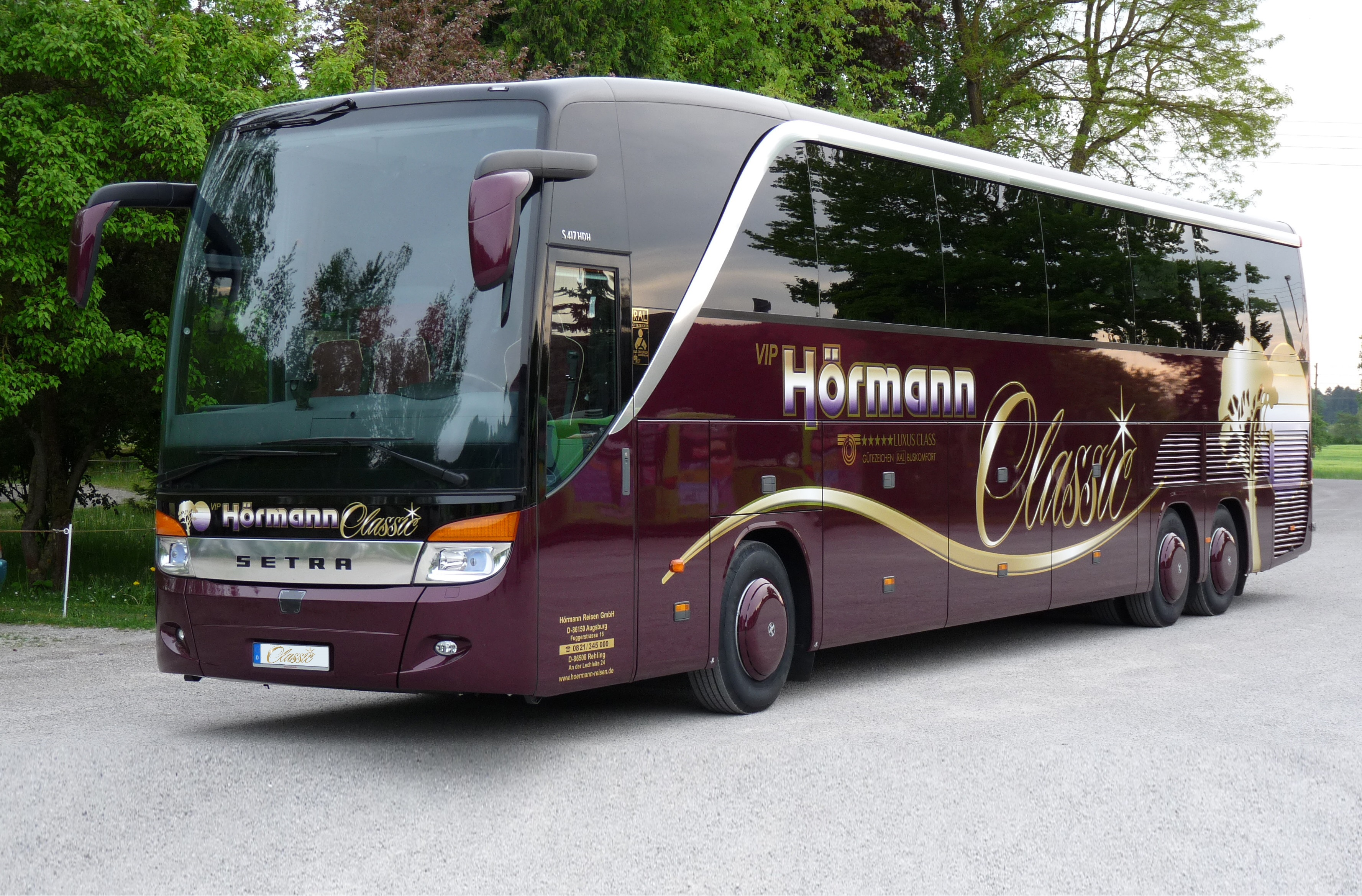 Chronik13 Classic-VIP-Luxusliner Leopold Mozart